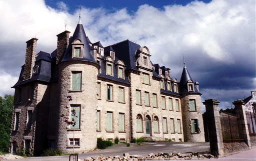 Le château de Lady Mond, à Belle-Isle-en-Terre (Côtes-d'Armor, Bretagne, France)